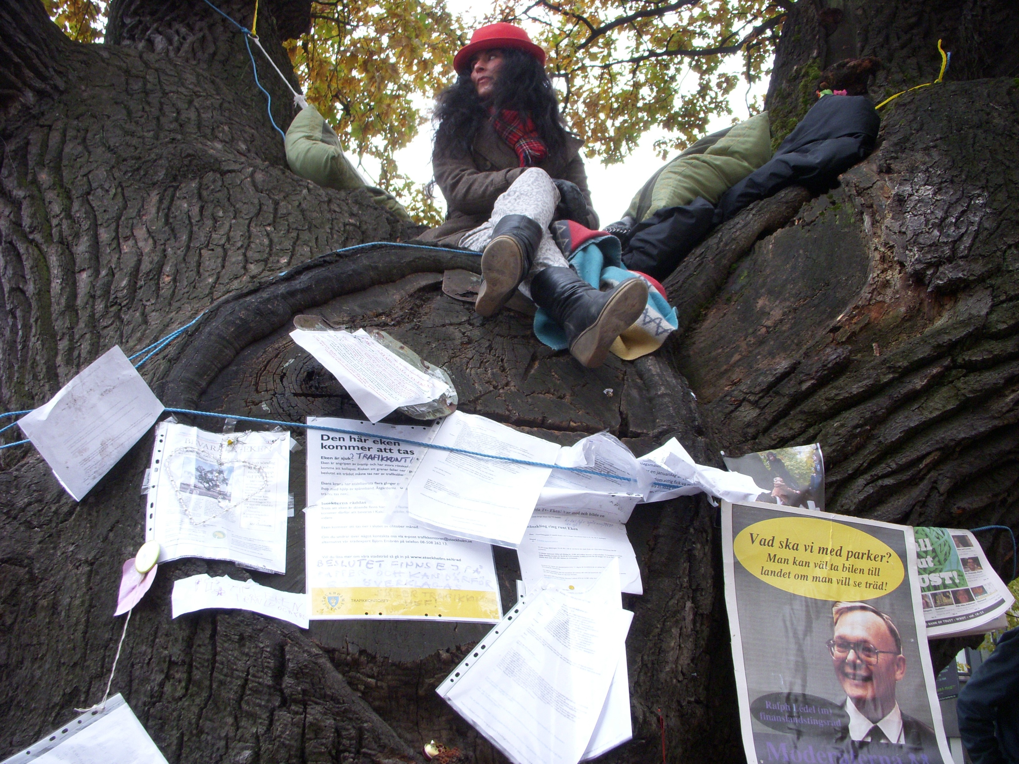 TV-eken på Oxenstiernsgatan, Östermalm i Stockholm, protester "Rädda Eken"